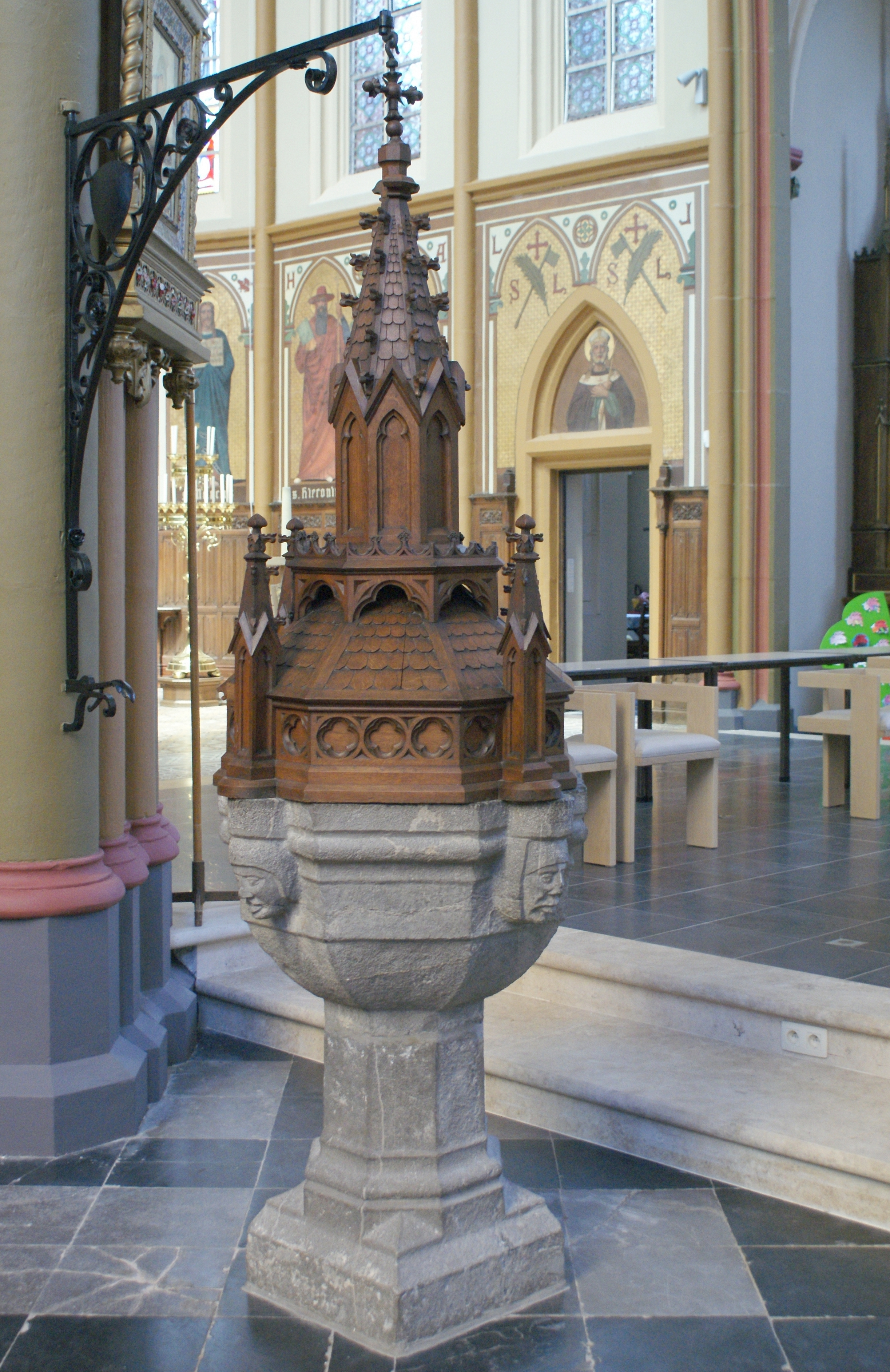 Parochiekerk Sint-Ursula (Lanaken) - Doopvont uit de 14-de eeuw.